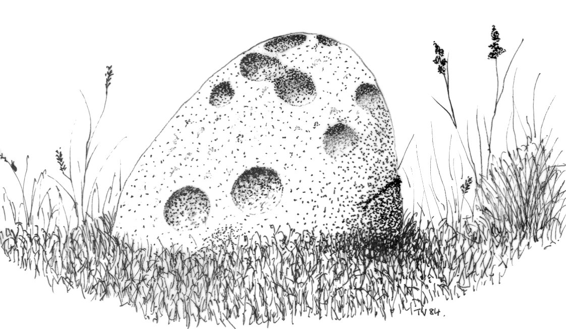 stele basse age du Fer Guérande